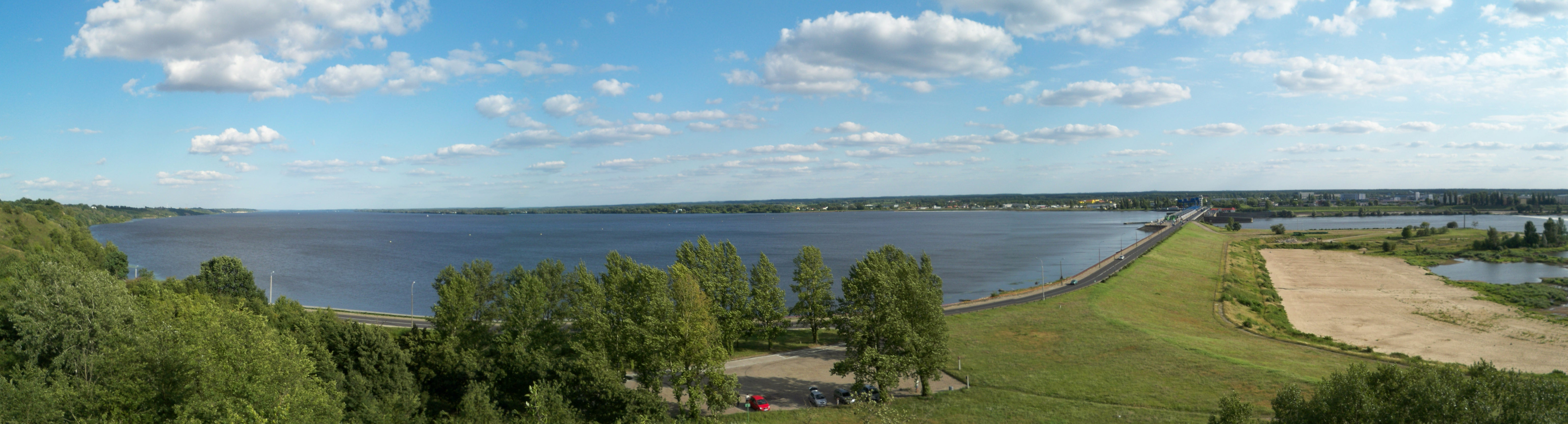 Stopień wodny na Wiśle we Włocławku (2009 r.)